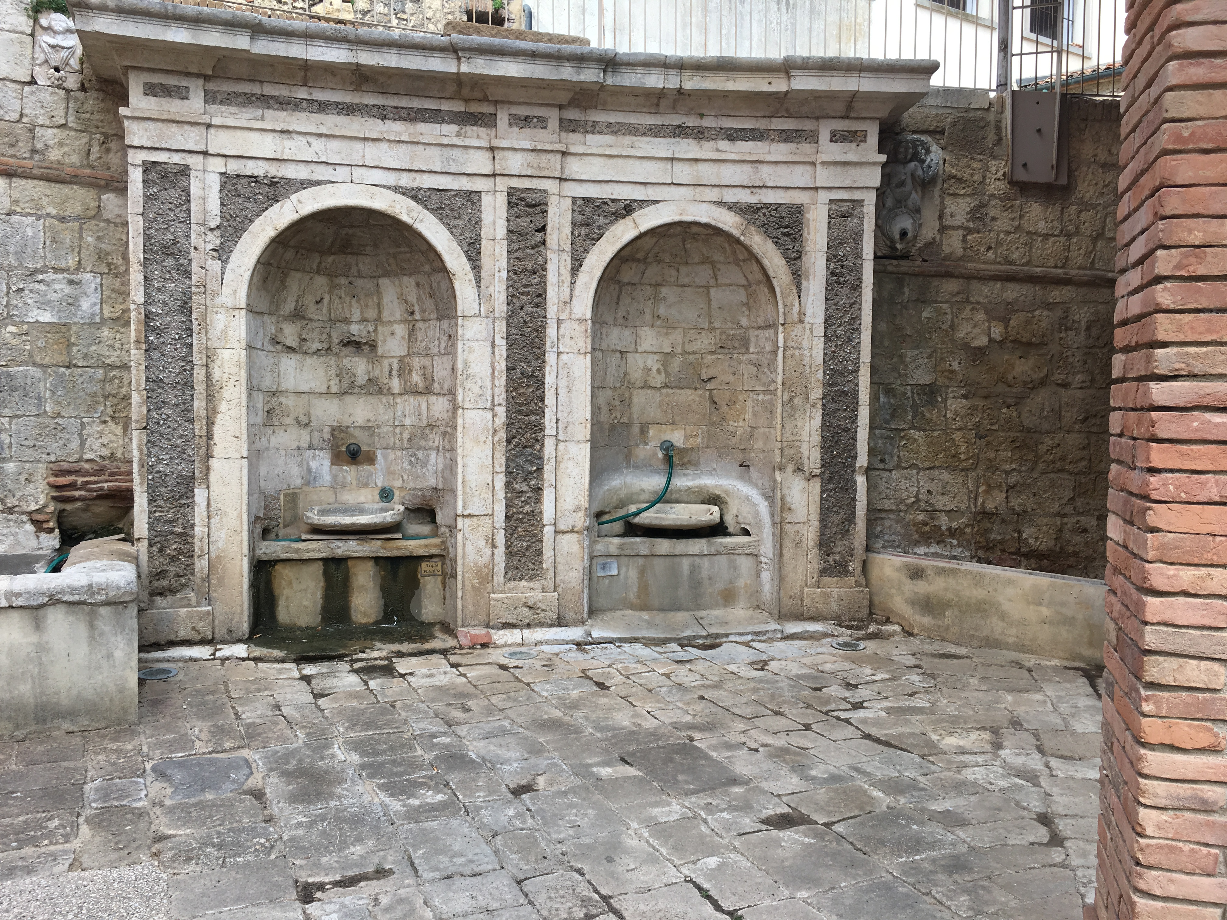 Bibbona